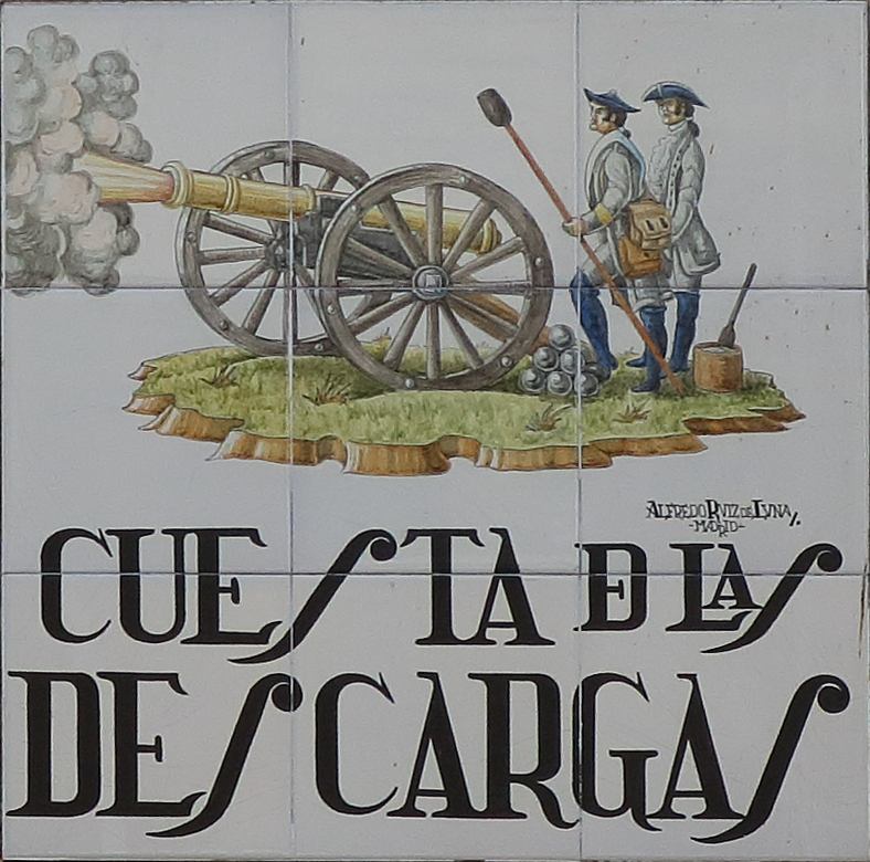 Cuesta de las Descargas, placa de calle